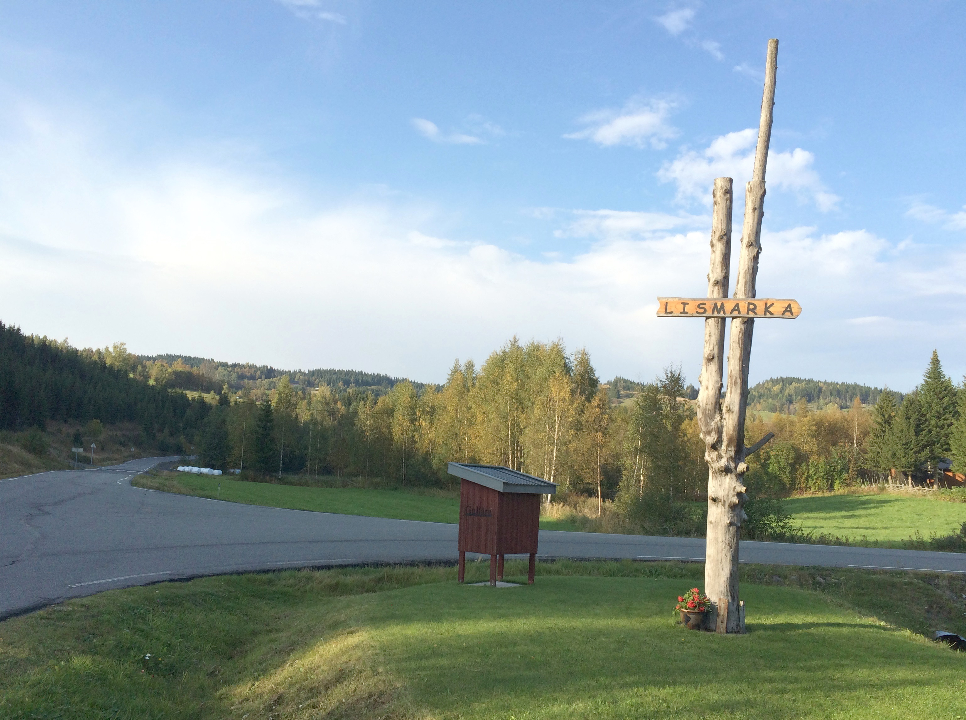 Lismarka i Ringsaker, der fylkesvei 320 møter fylkesvei 2